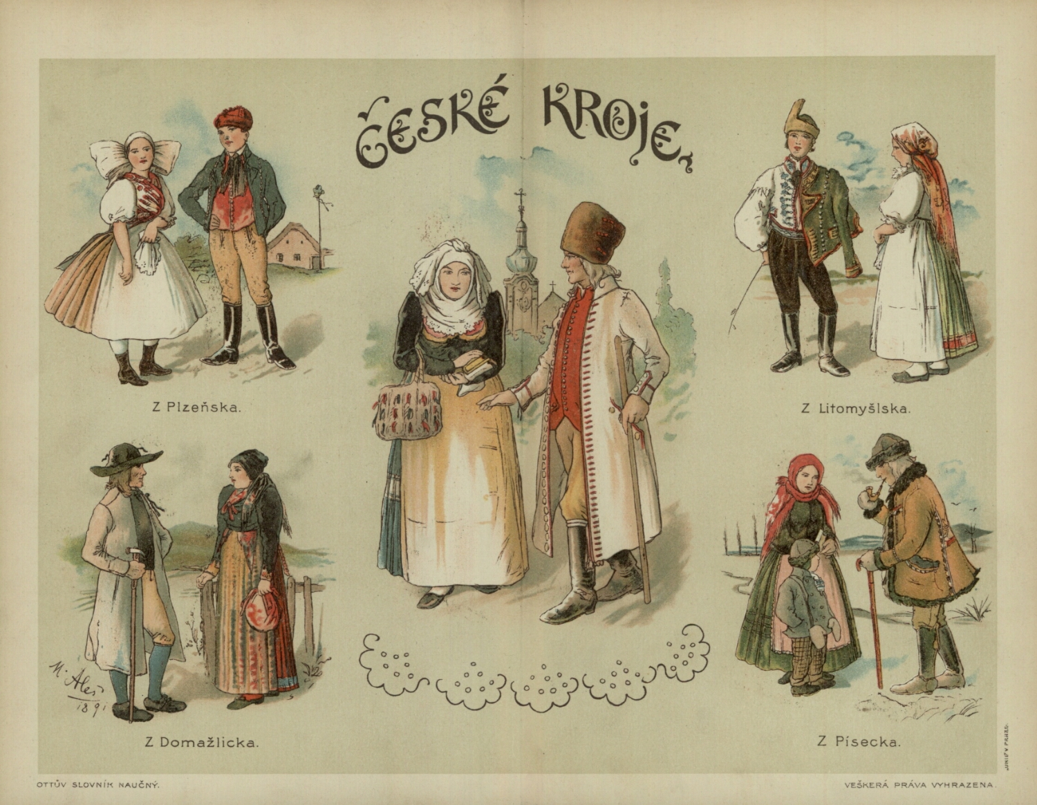 Obrázek „České kroje“ z Ottova slovníku naučného.